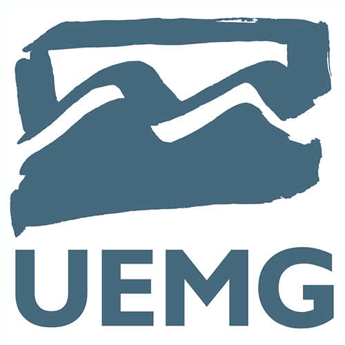 Logo da Universidade do Estado de Minas Gerais